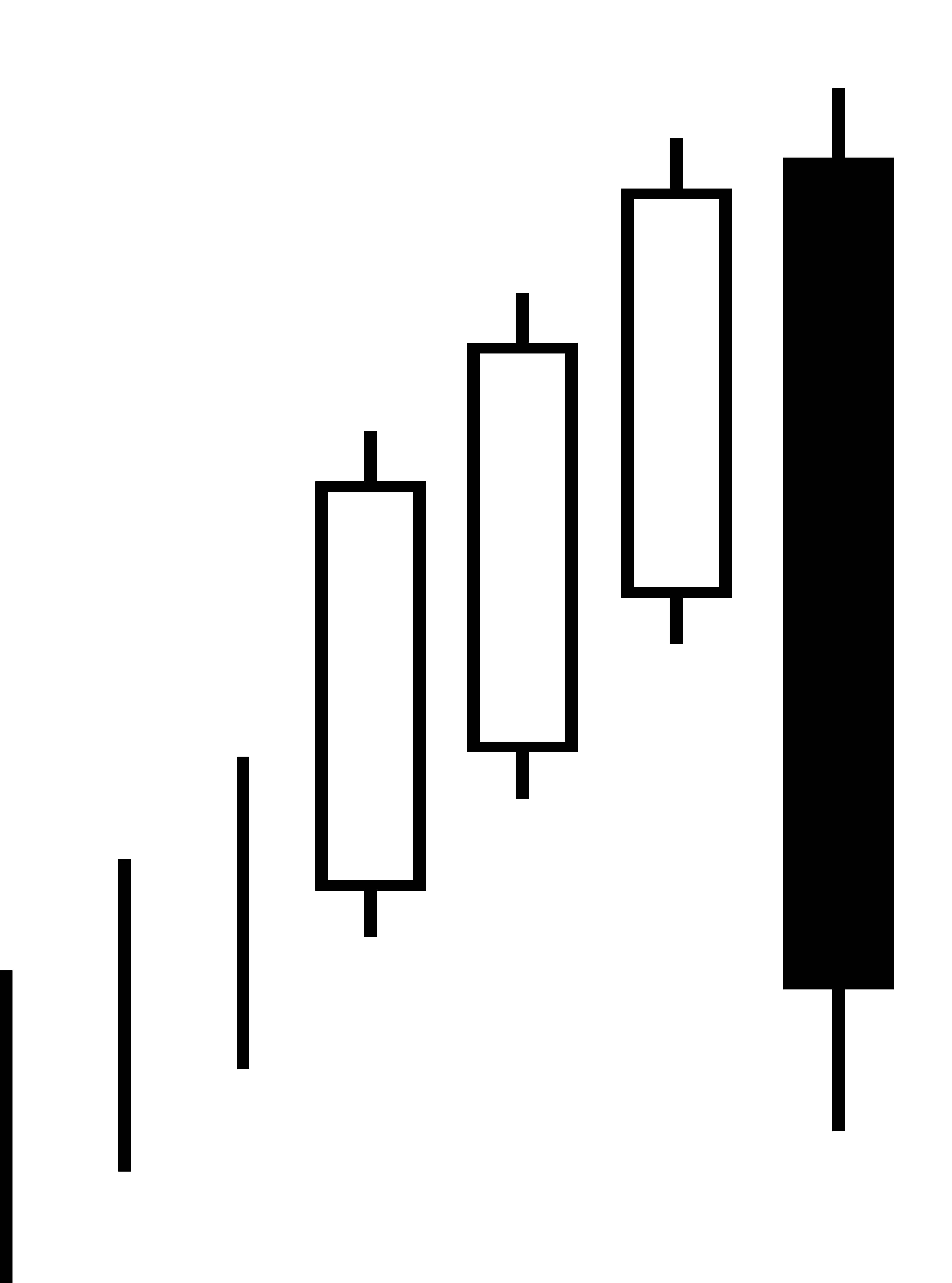 Bullish Three Line Strike